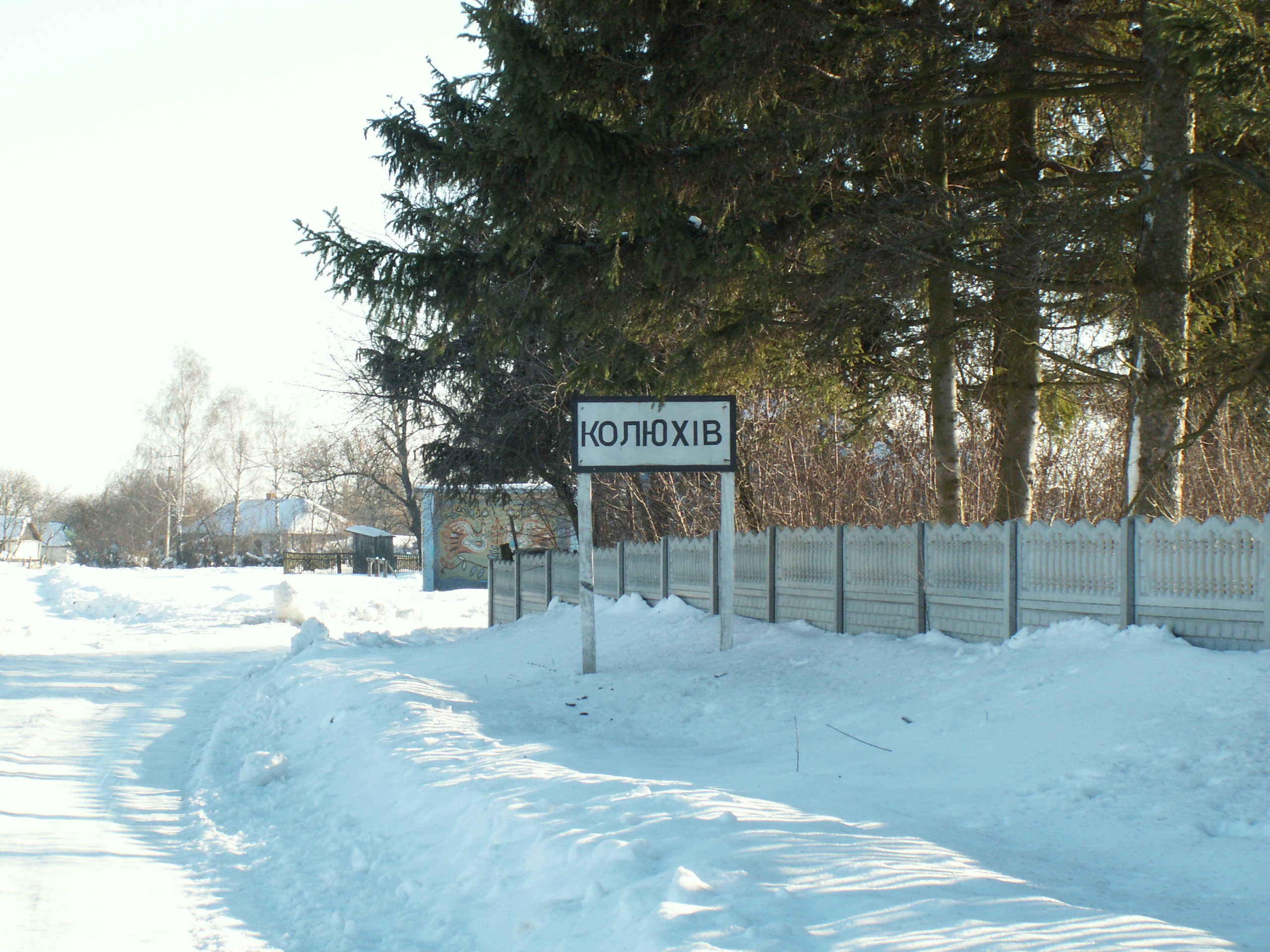 Дороговказ в с. Колюхів